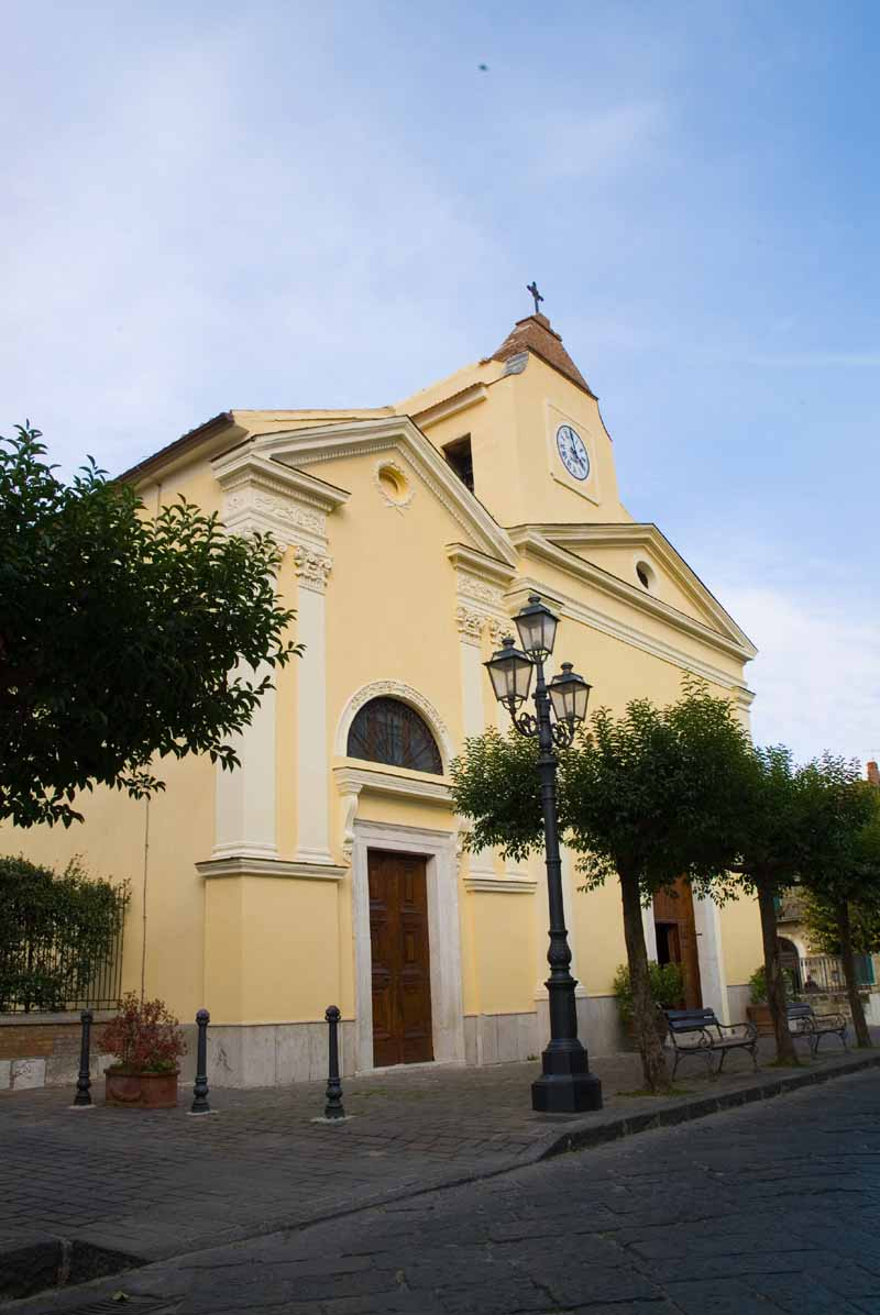 Paolisi, la chiesa parrocchiale di Sant'Andrea.